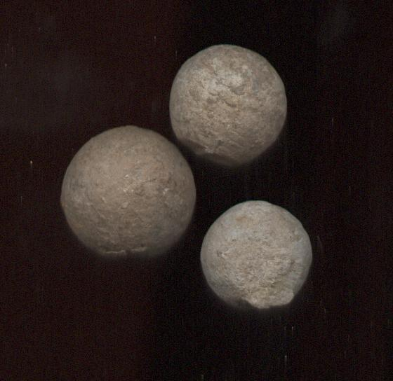 Lambsheim, Deutschland Rheinland-Pfalz, Gefecht, 1795, Musketenkugeln vom Schlachtfeld